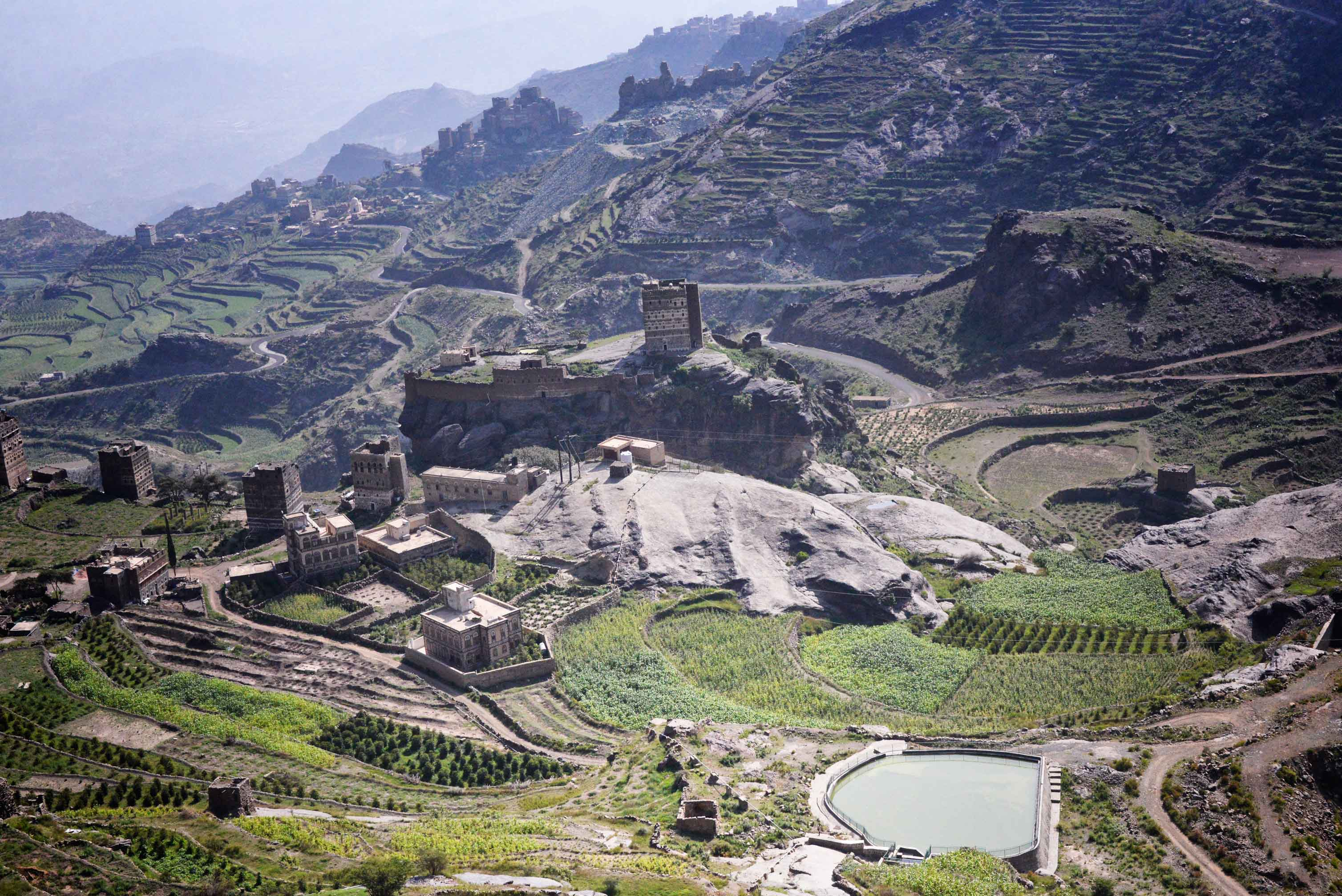 Yemen